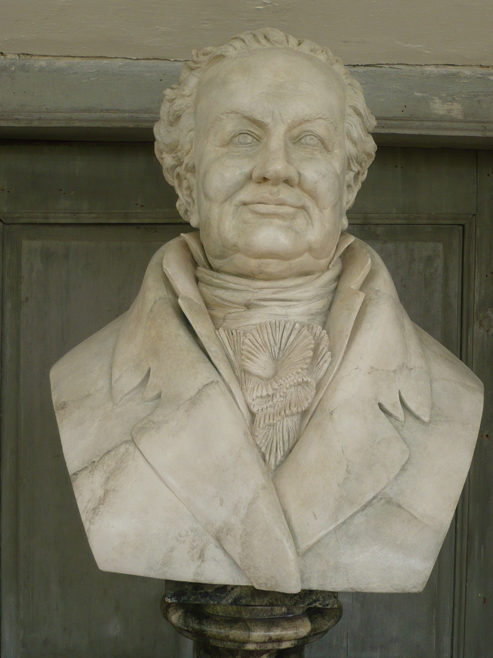 Büste von Friedrich Ludwig von Sckell (* 13. September 1750 in Weilburg an der Lahn; † 24. Februar 1823 in München), im Alter von 58 Jahren geadelt, war ein deutscher Gartengestalter, Begründer der „klassischen Phase“ des Englischen Landschaftsgartens in Deutschland sowie Stadtplaner in München. Büste steht im Palmenhaus im Nymphenburger Park.